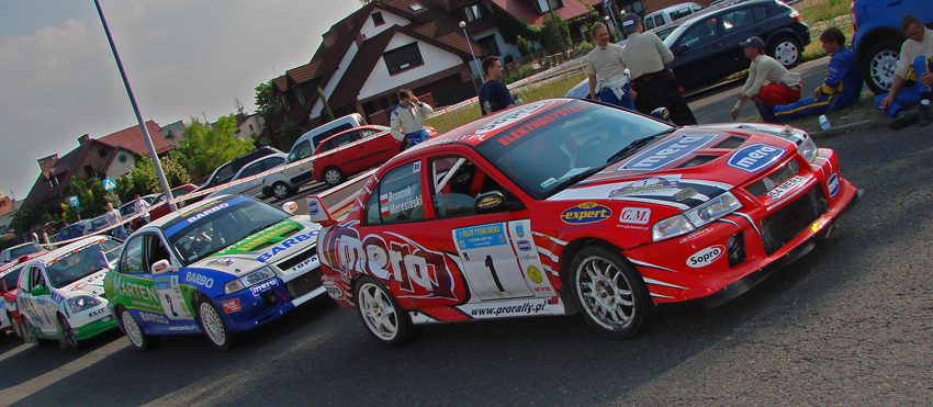 Forma sportu samochodowego, która odbywa się na drogach publicznych.